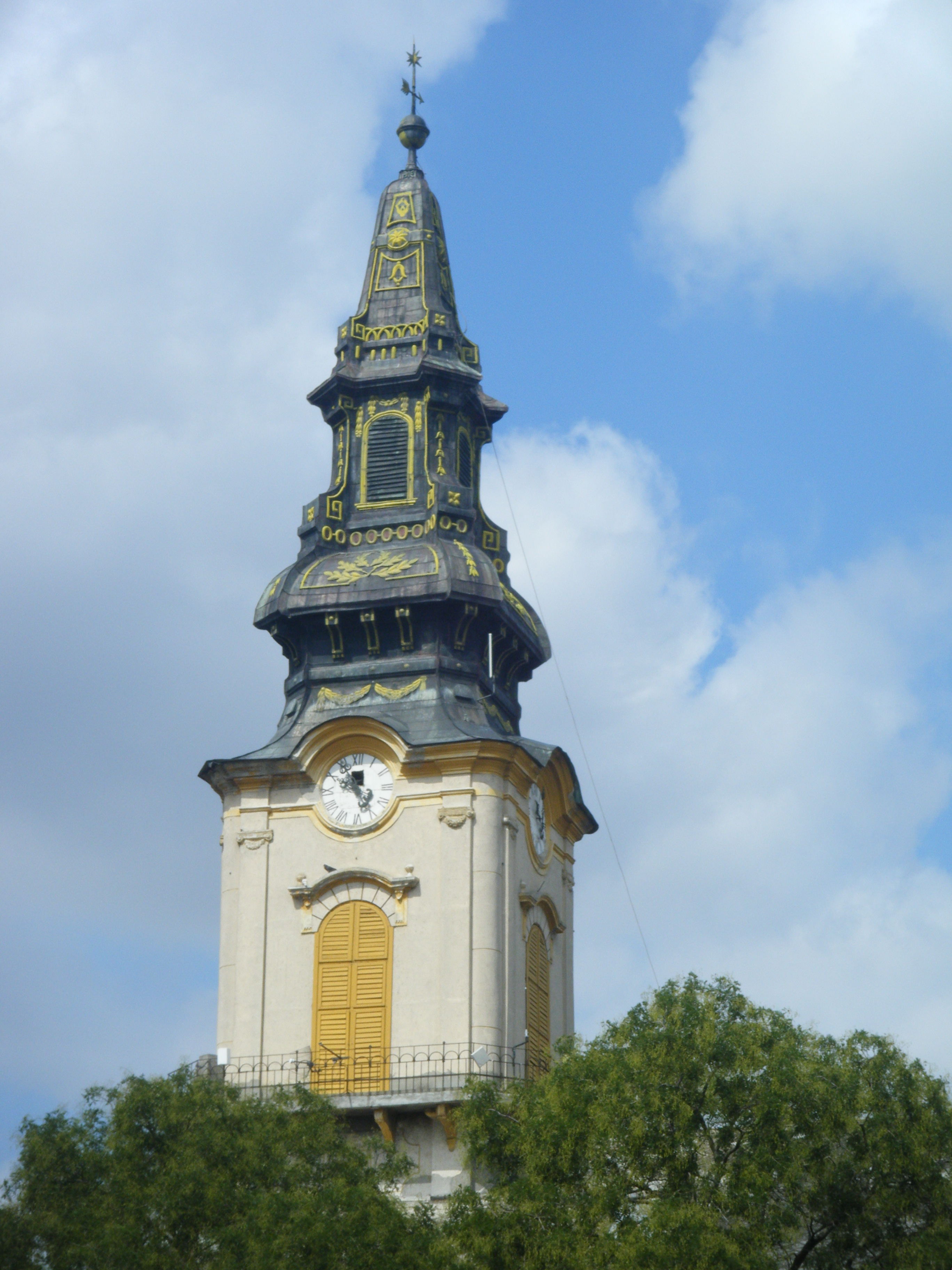 A túrkevei református templom díszes tornya